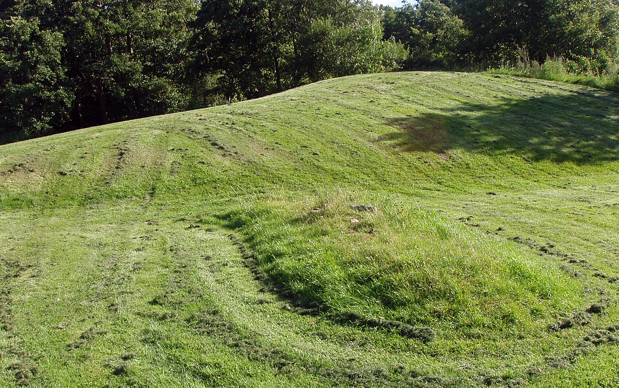 Hjortholm Voldsted ligger ved den sydøstlige ende af Furesøen, ved Frederiksdal i Sorgenfri Sogn, Lyngby-Taarbæk Kommune. Sjælland, Denmark Hjortholm Voldsted